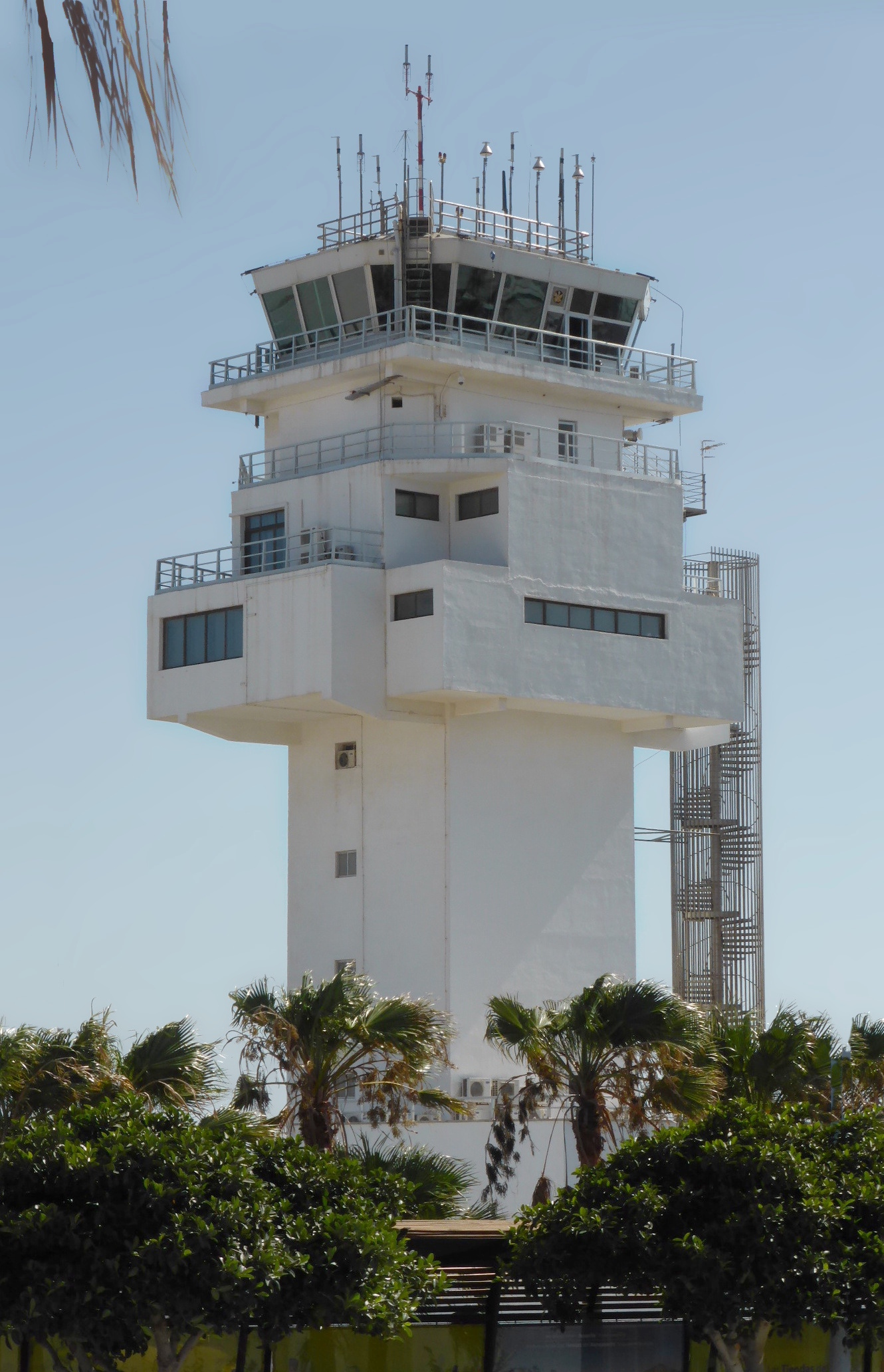 Turm des Flughafens Teneriffa Süd.